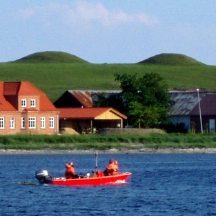 Tvillingegravhøjene "Marens Patter" fra bronzealderen set fra strandtangen i Virksund ved Limfjorden, Danmark. Den ene har gennem flere tusinde år fungeret som en af landets bavnehøje til signalgivning med bål, der kan ses over store afstande.